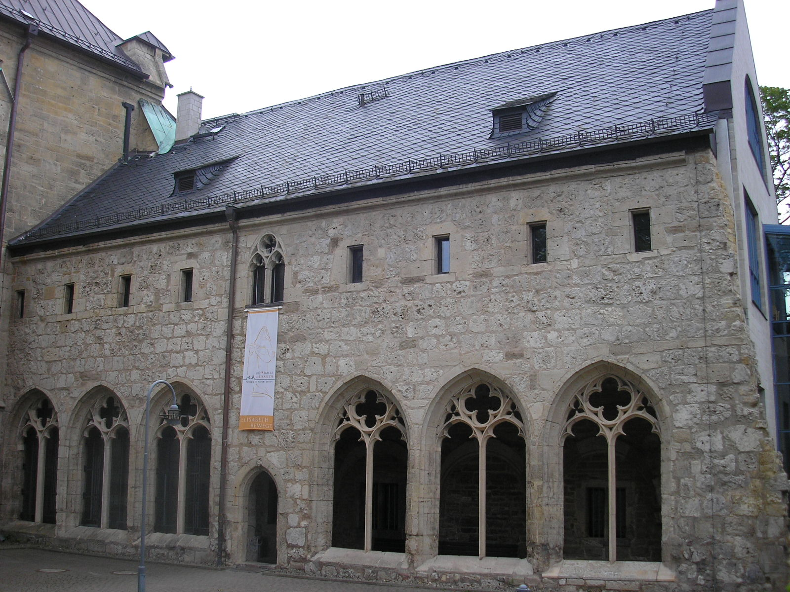 Der Stiftsbau am Nordrand des Domes von Nordhausen (Thüringen).